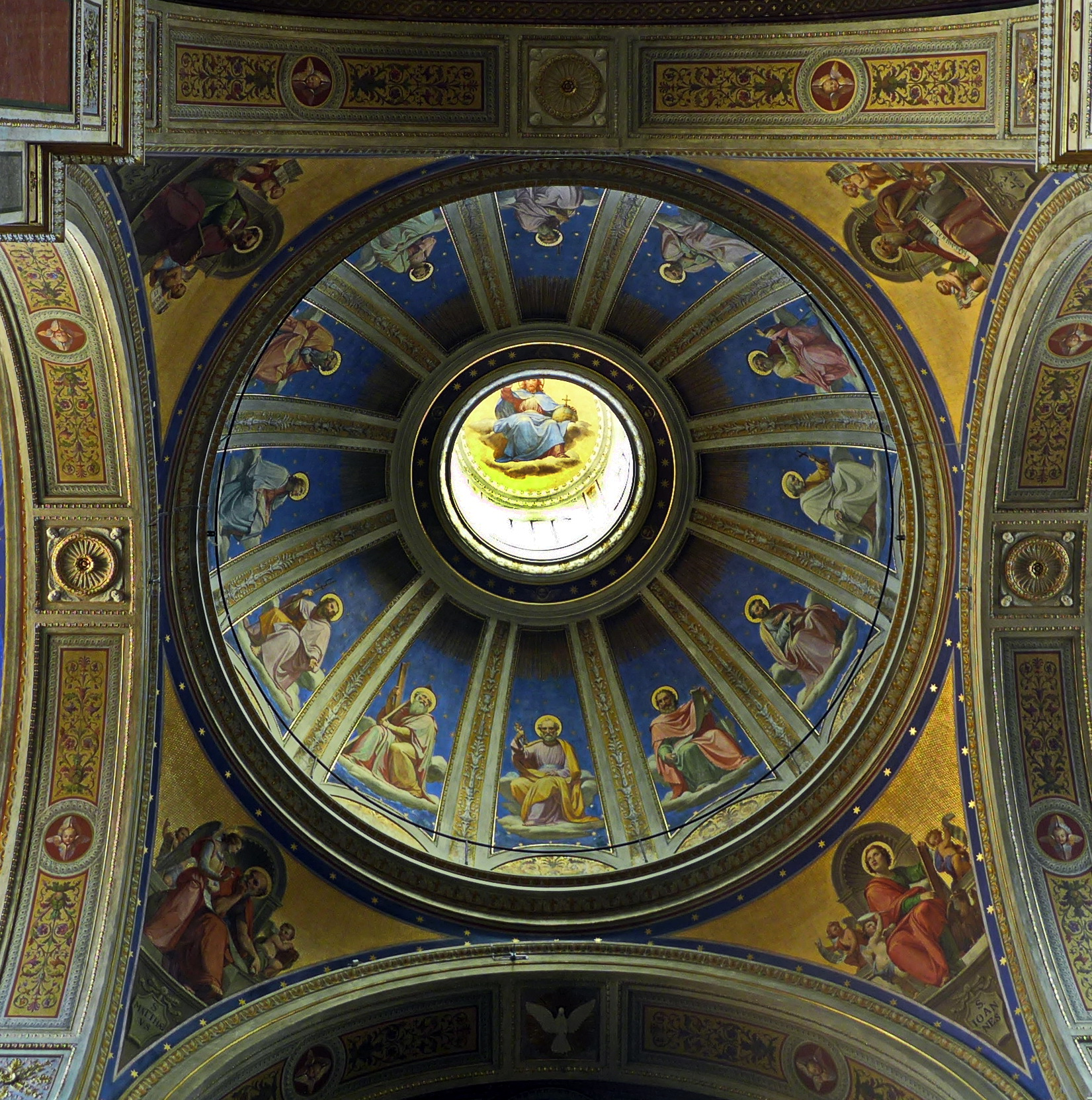 Sant'Agostino (Rom) Vierungskuppel